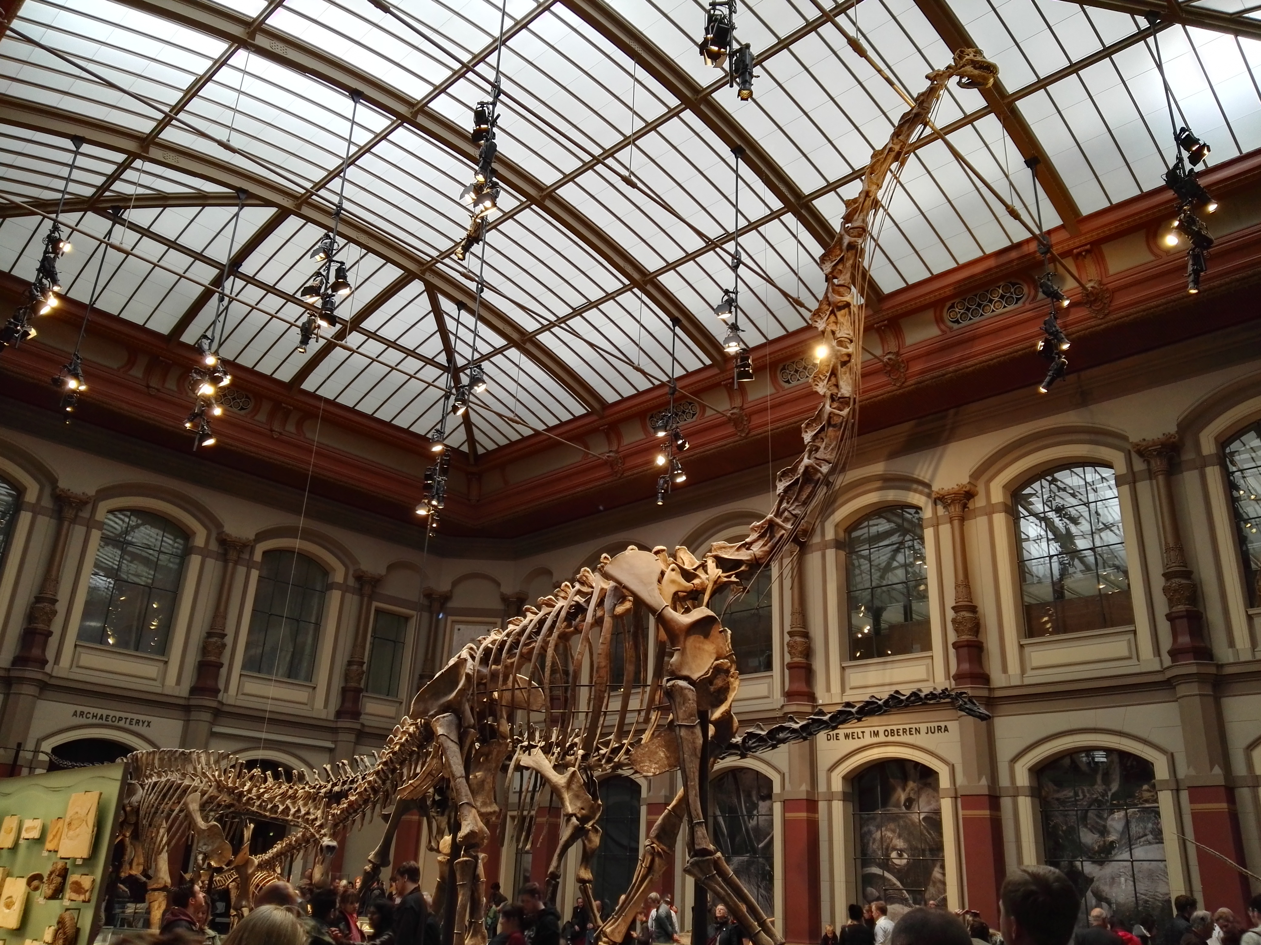 Brachiosaurusskelett im Museum für Naturkunde in Berlin